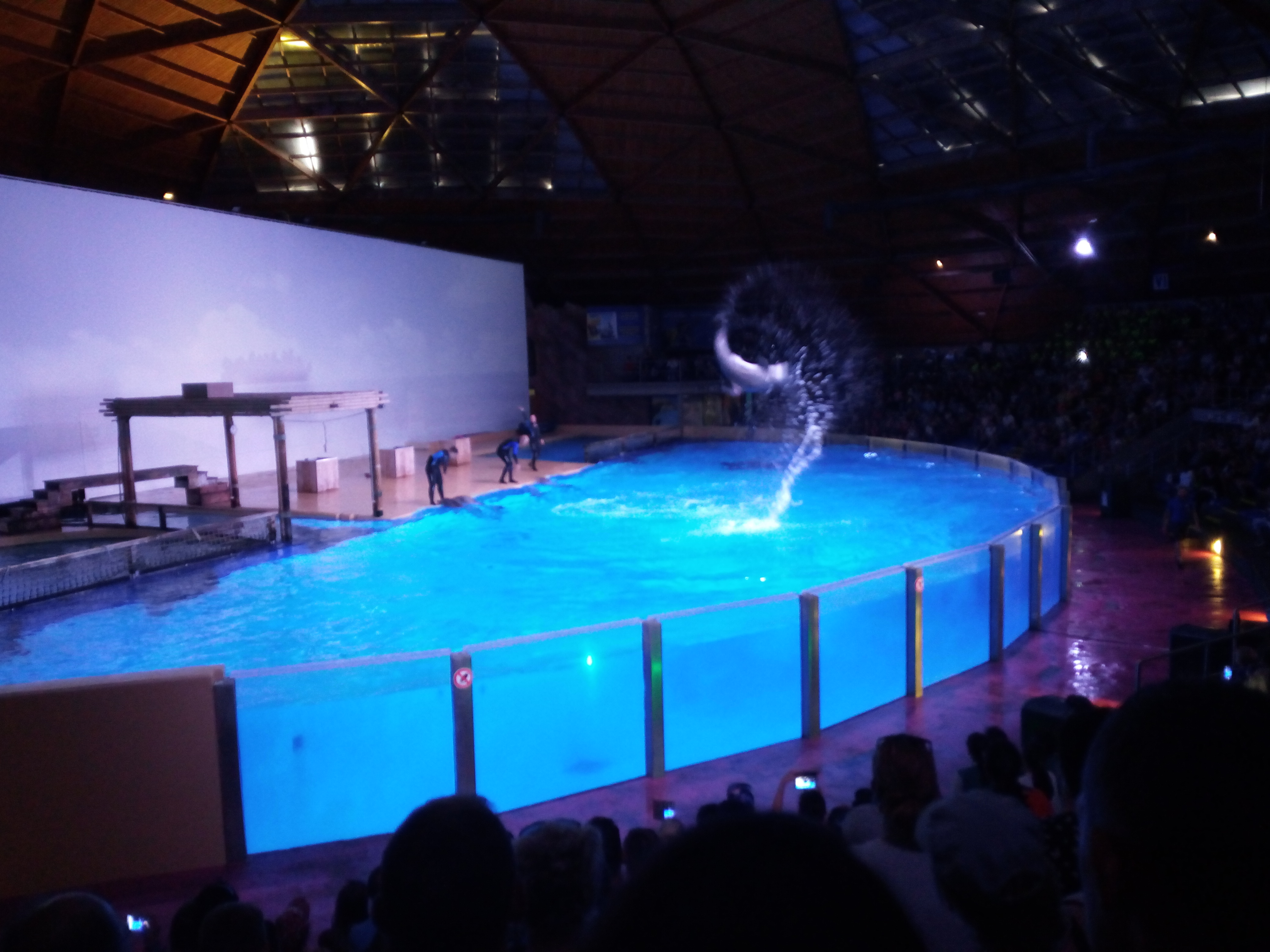 Dolfijnenshow in het Boudewijnpark (Boudewijn Seapark)